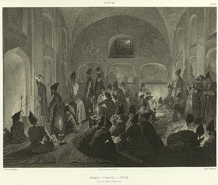 Armenie. Mosquee persane a Erivan.